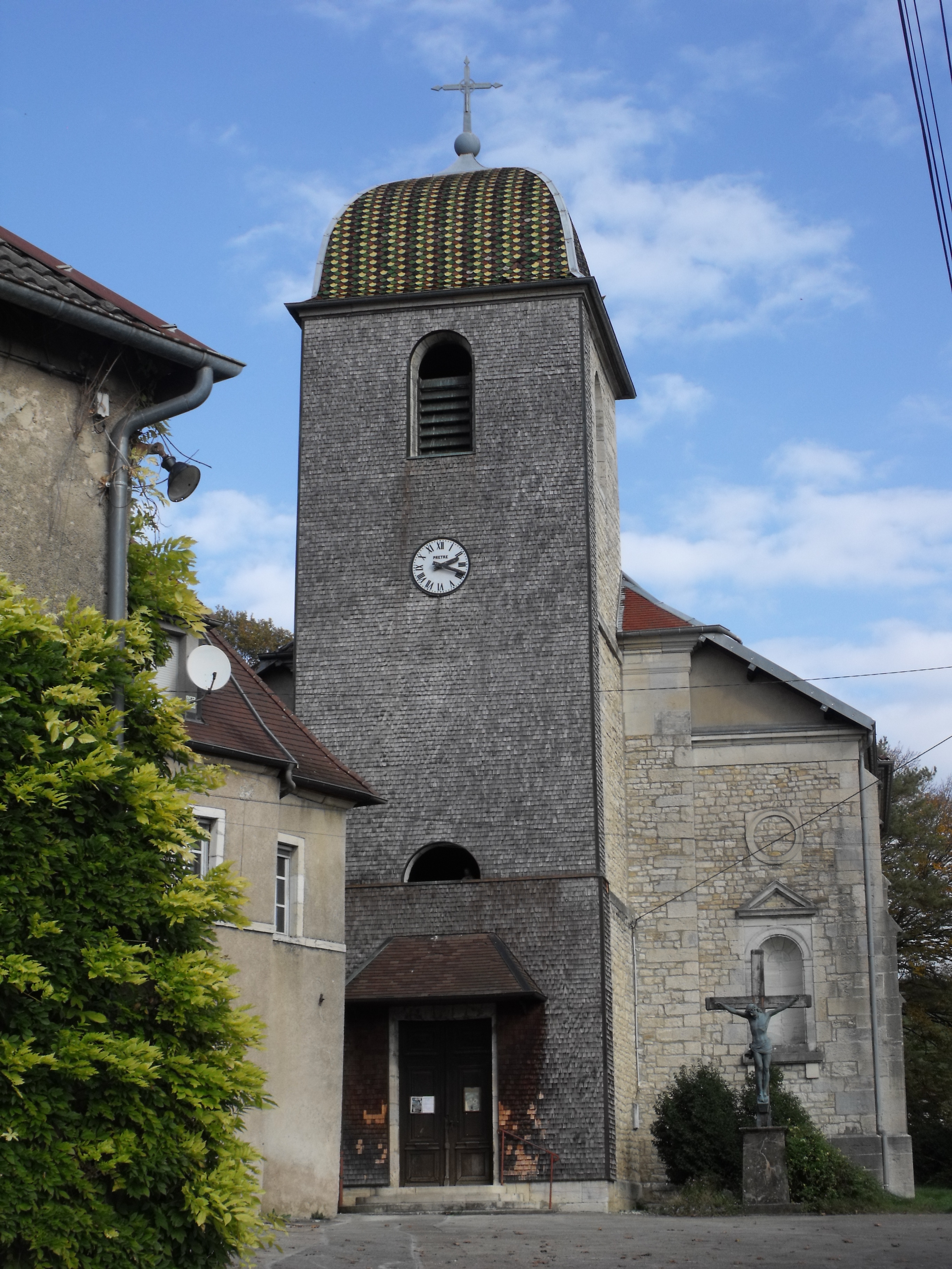 Eglise d'Amagney, Doubs, France